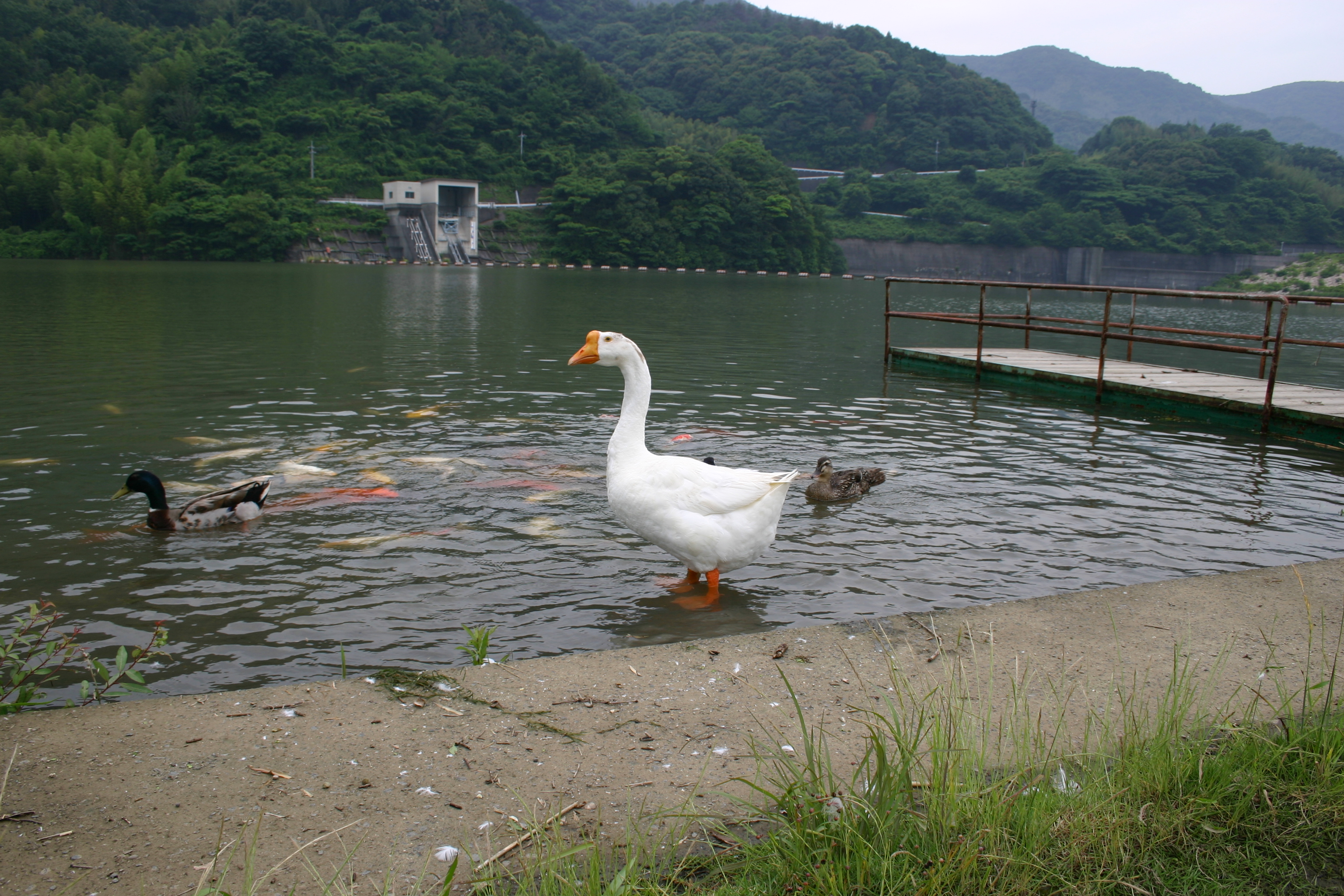 屋代ダムの観光地